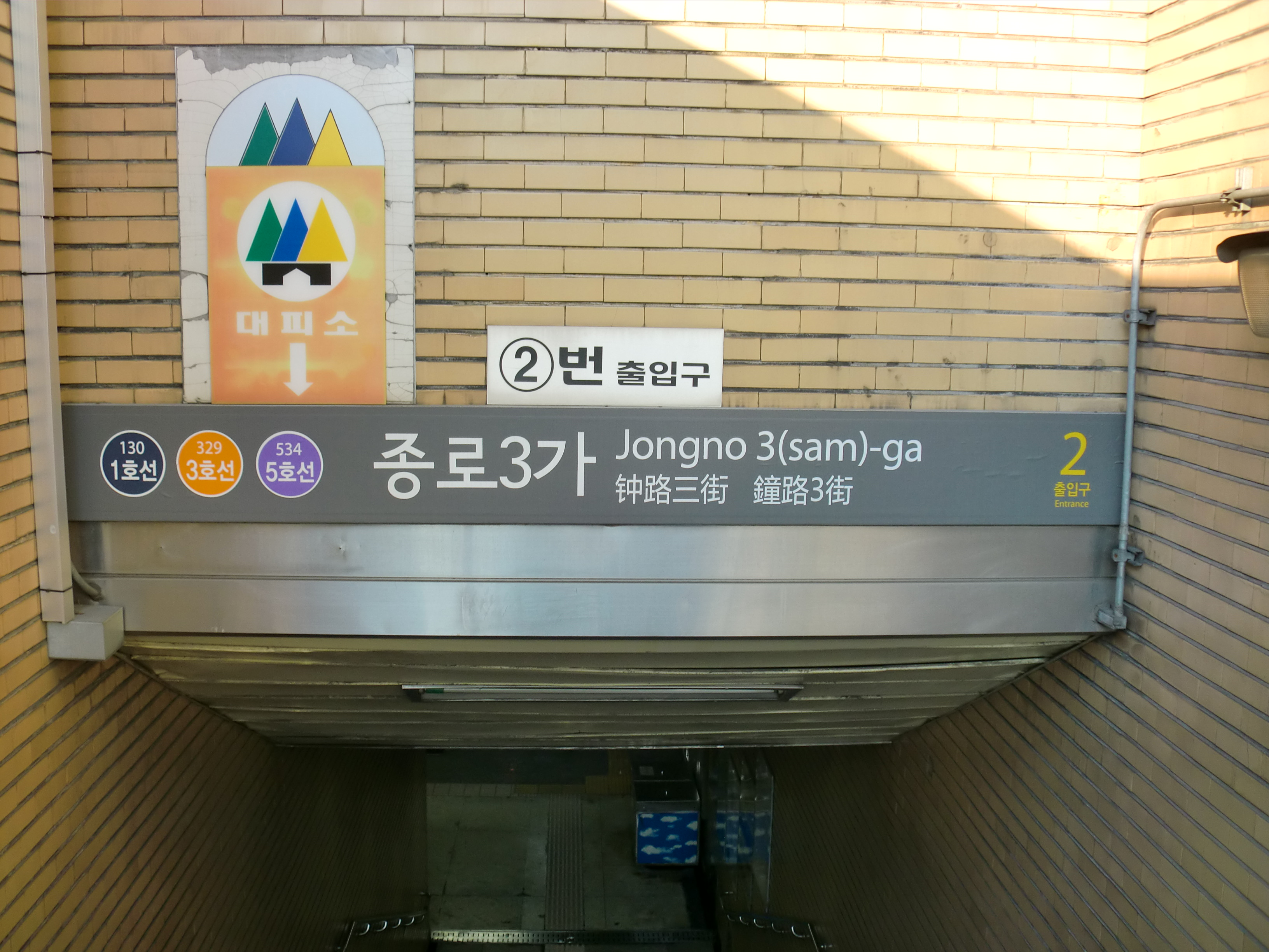 종로3가역 2번출입구